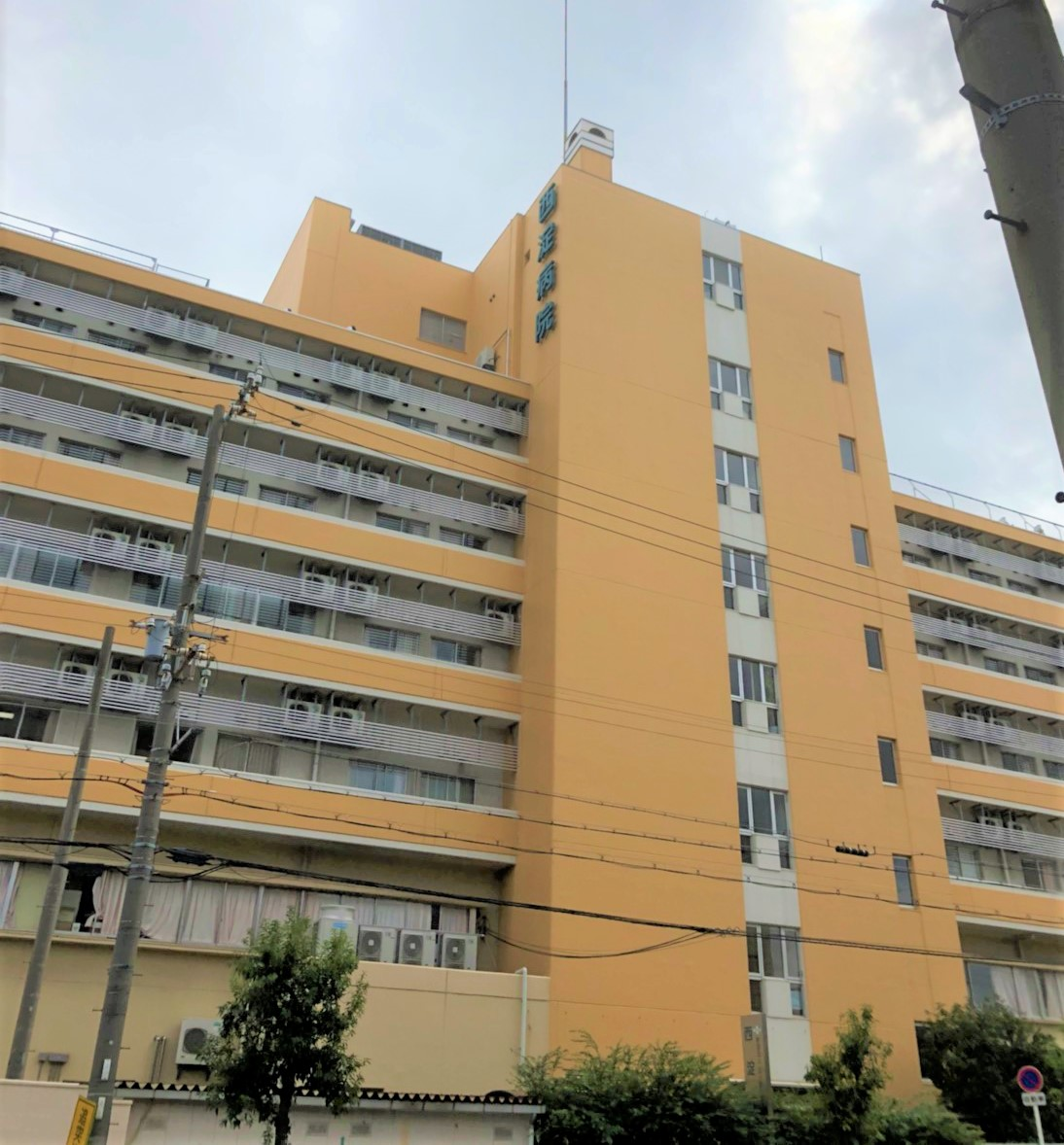 西淀病院外観